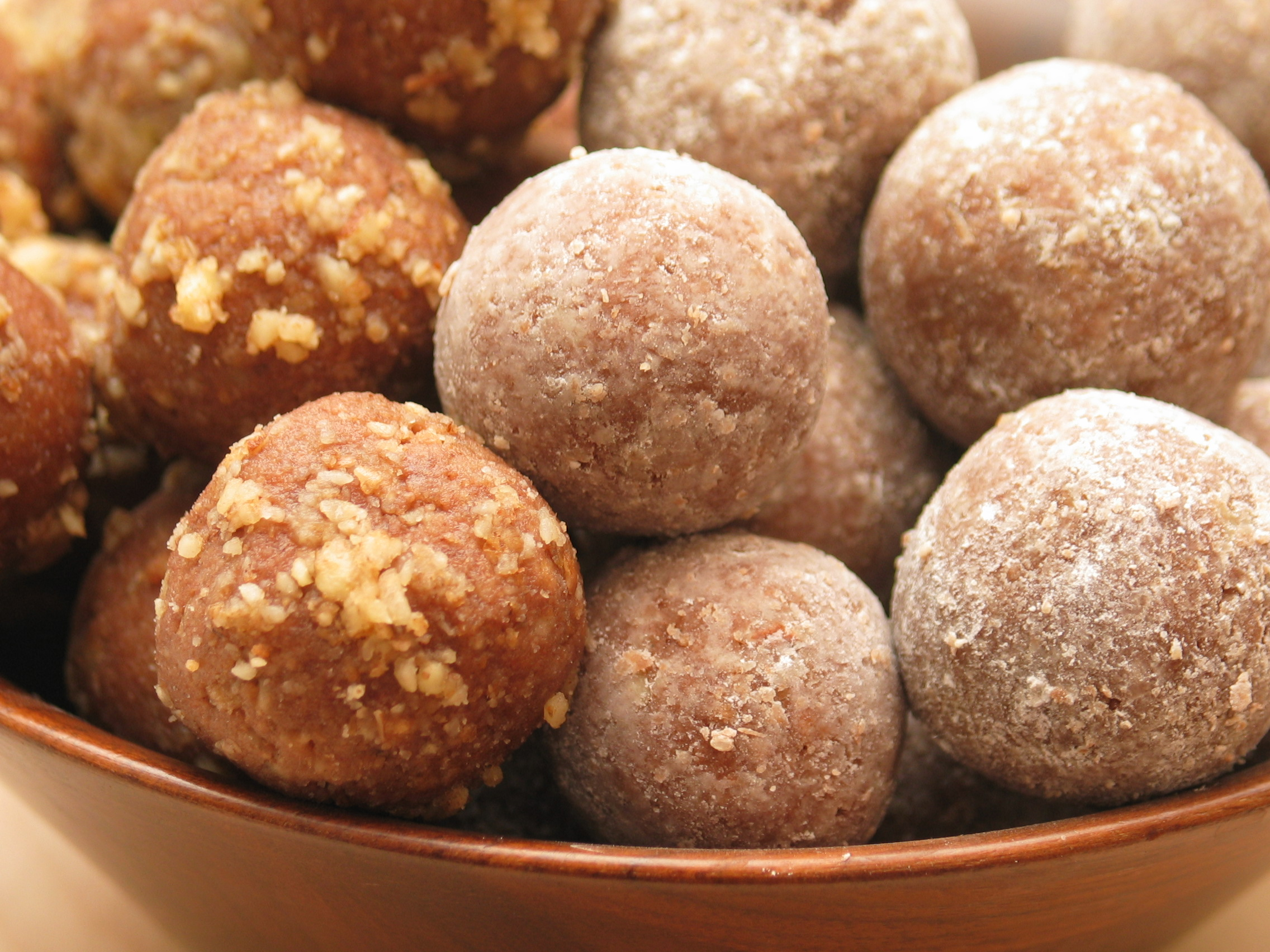 For Cookbook:Rum balls on wikibooks